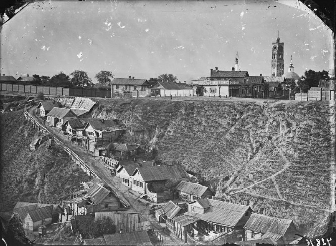 Карелин Андрей Осипович Вид на Гребешок Нижний Новгород 1870-е - 1880-е годы